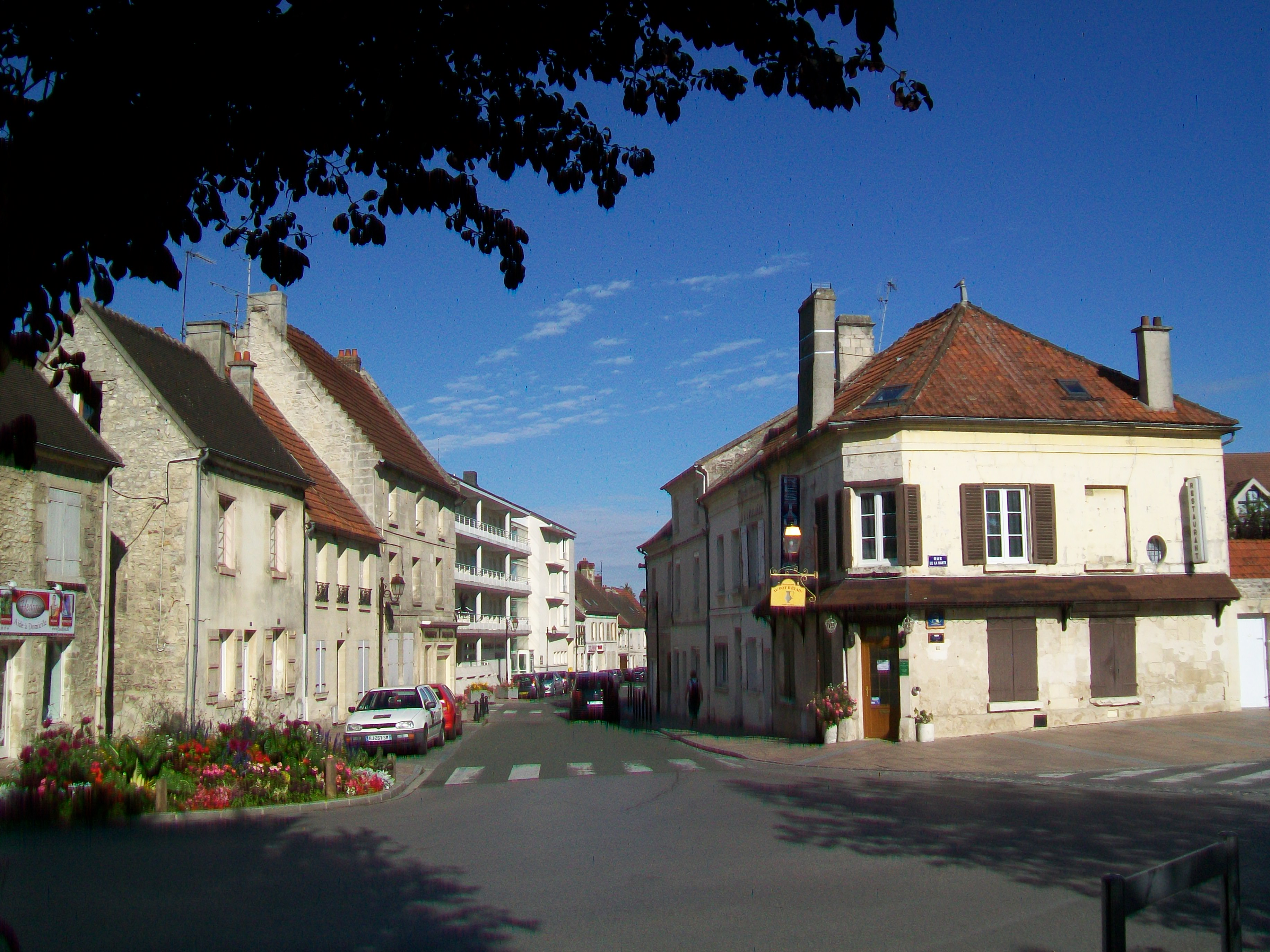 Carrefour des rues Saint-Lazare (en face) et de la Hante (à droite), depuis l'est.